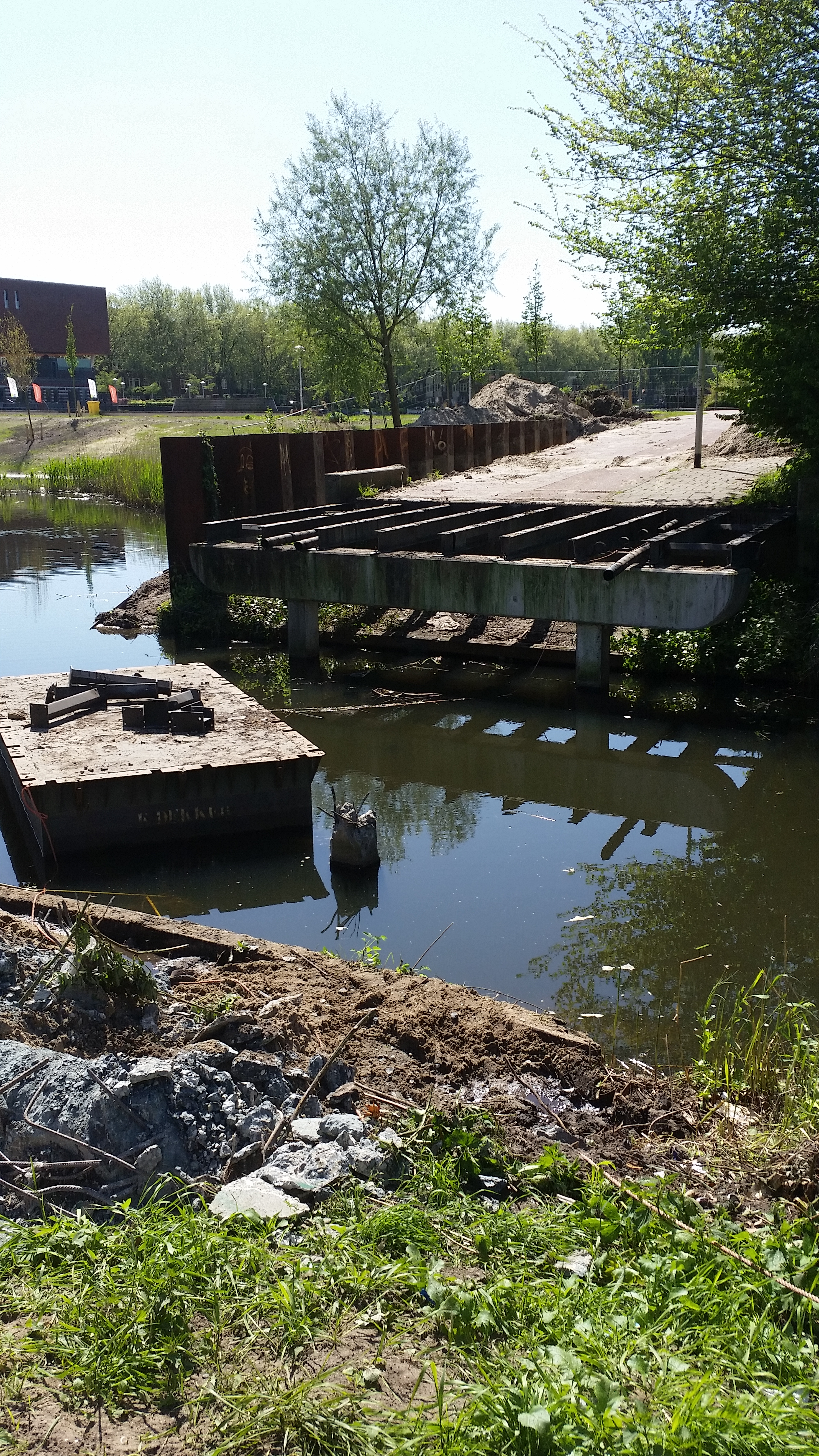 Brug 1817 in de Schipluidenlaan, deels gesloopt in mei 2018